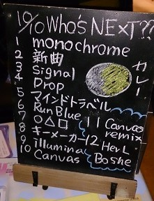 amiinaセトリボード(20151010(1))